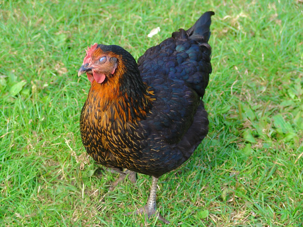 Kura